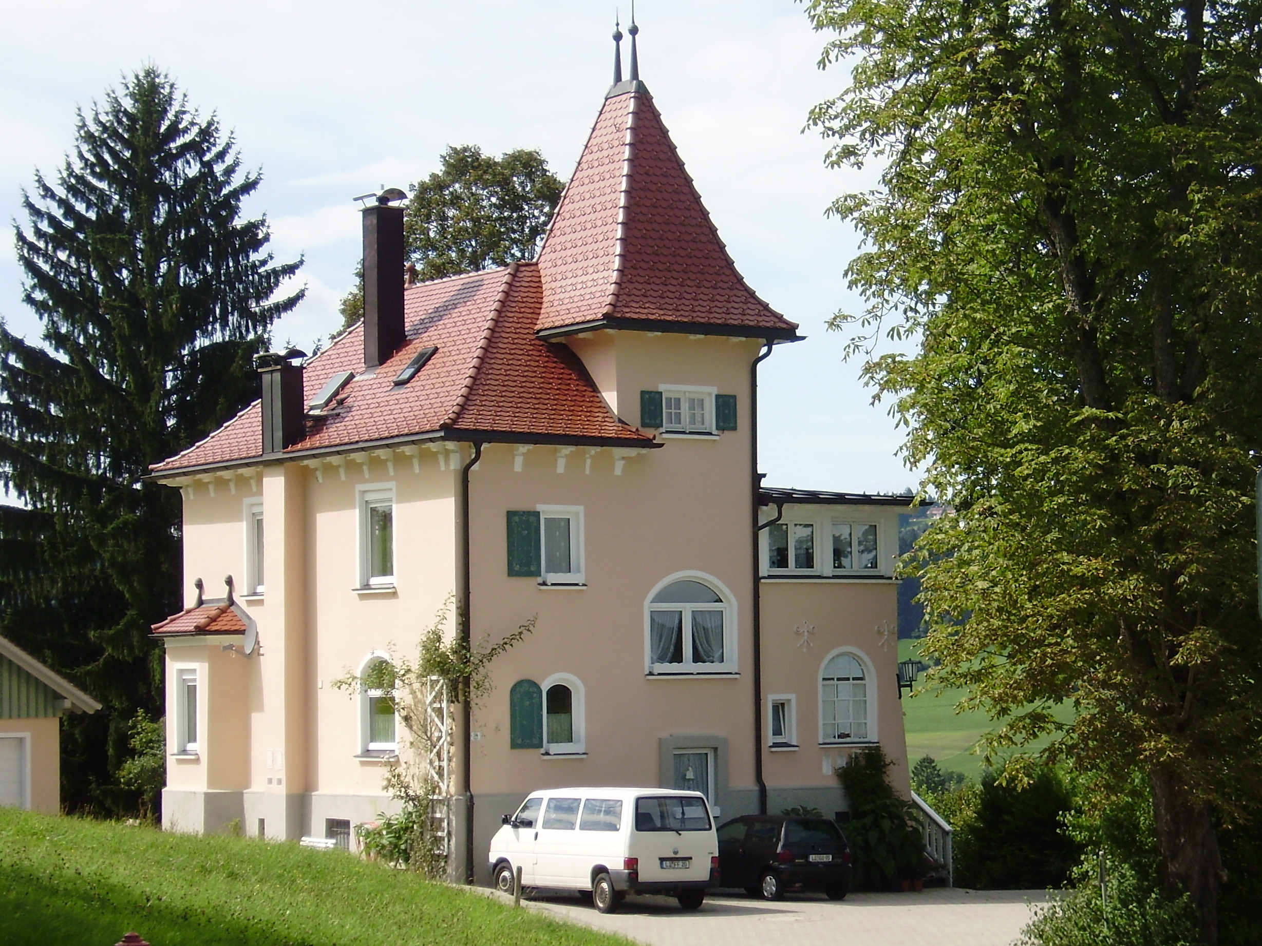 Villa am Sandbühl, Schulstr 34, Weiler iA von Südosten. Der Vater des Architekten und Baumeister Georg Bufler, der Maurermeister Josef Bufler (1835–1904), stellte das schmucke Gebäude 1903 fertig, konnte seinen Altersruhesitz aber nur ein Jahr bewohnen.